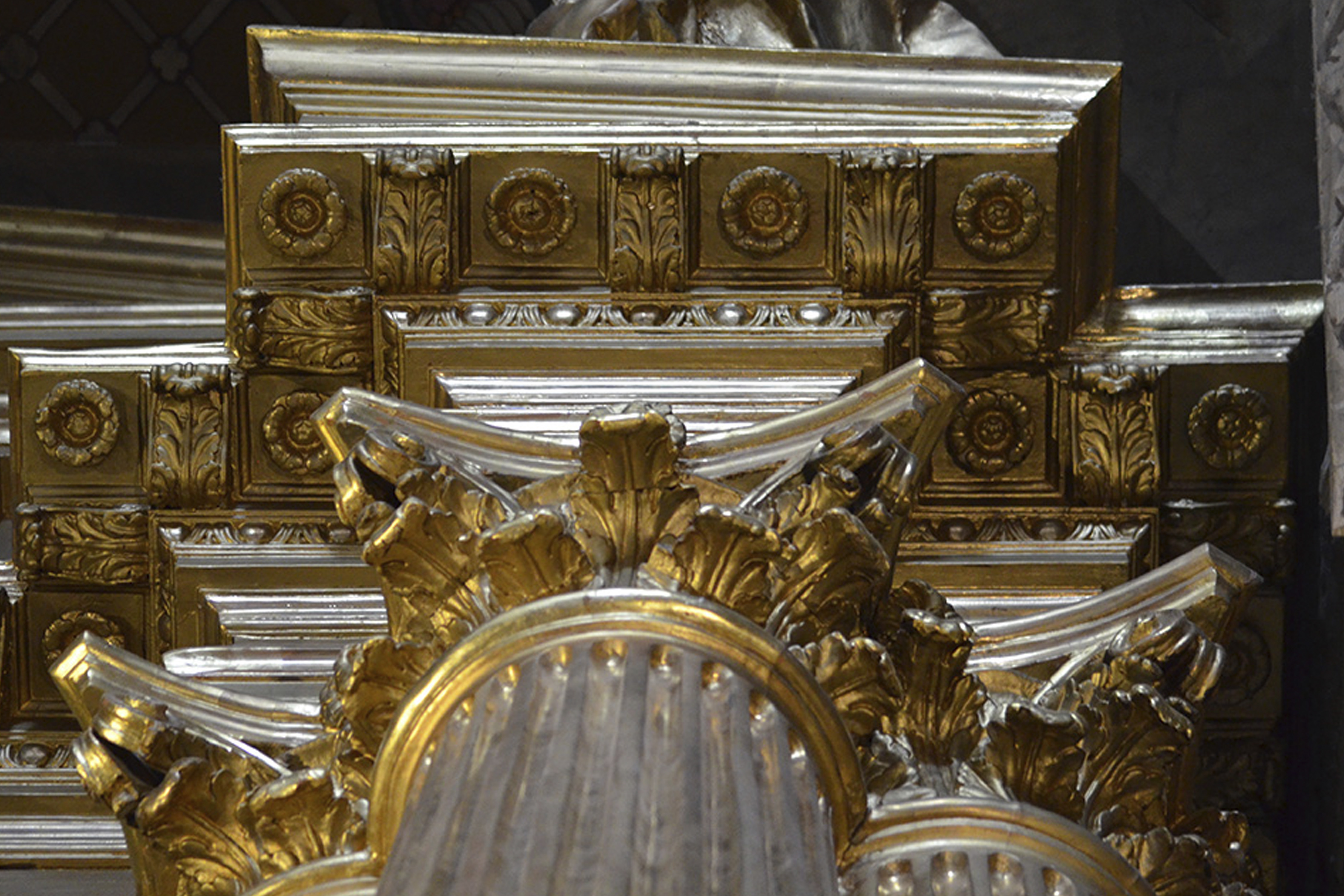 Columnes i capitells adosats, de fusta daurada en els capitells i les motllures.